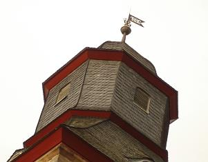 Heckershausen, Kirche, verschiefertes Glockengeschoss mit Haube des östlichen Chorturms v. SO (2003-12-26).